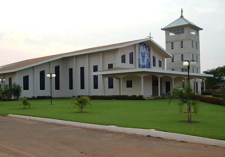 Igreja Católica de Querência